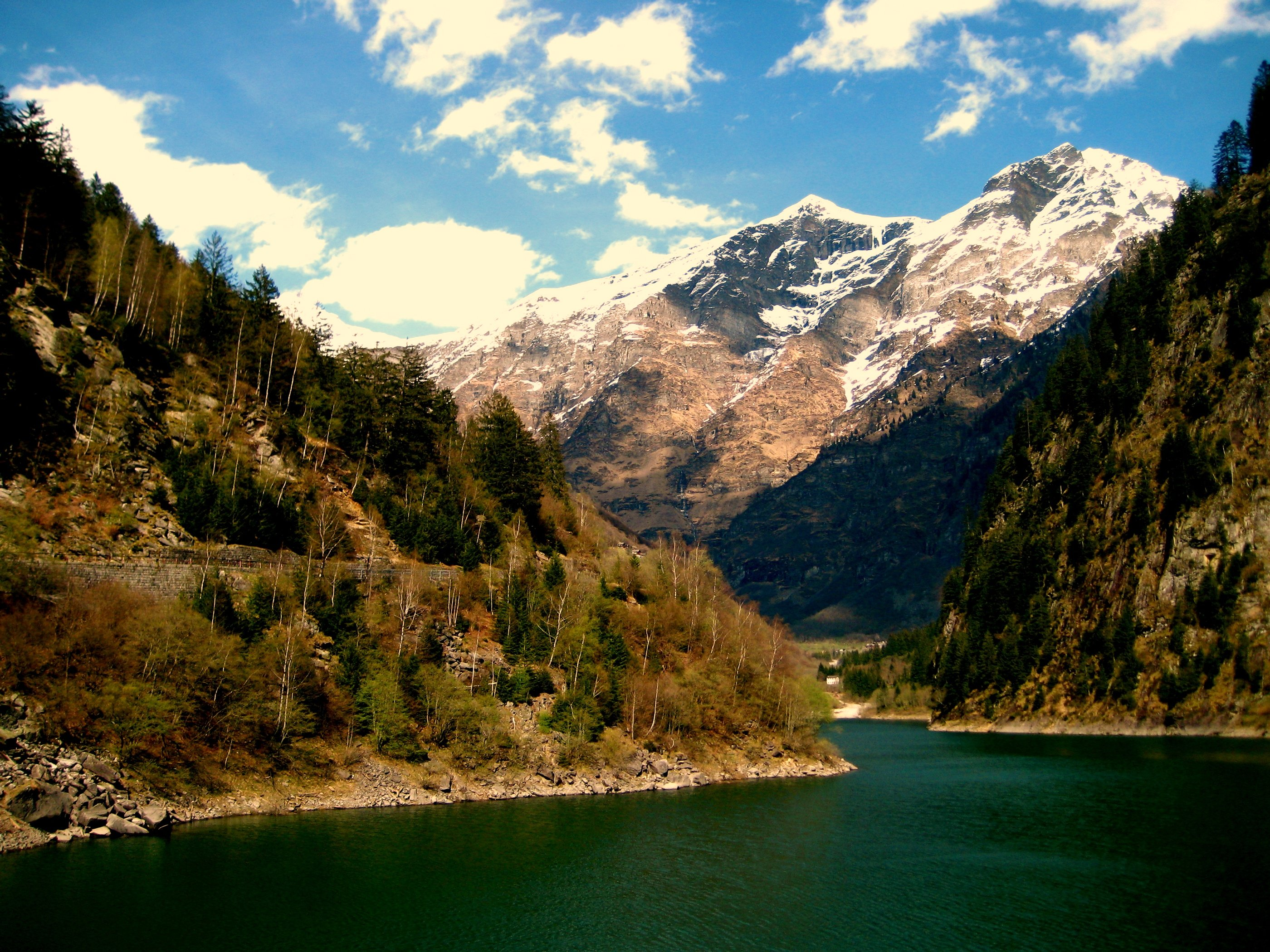 Lago di Malvaglia, Val Malvaglia, Ticino